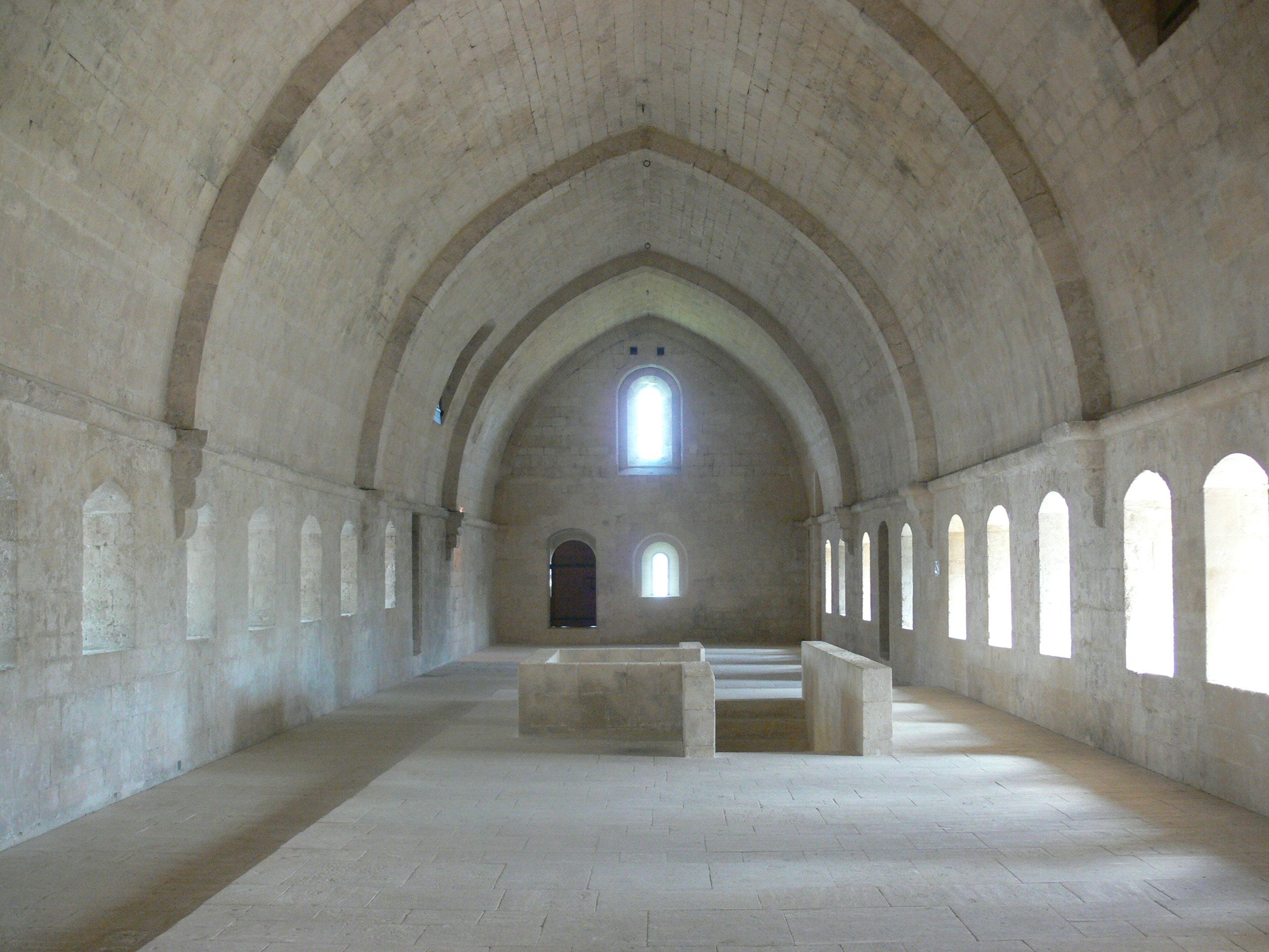 Abbaye de Silvacane